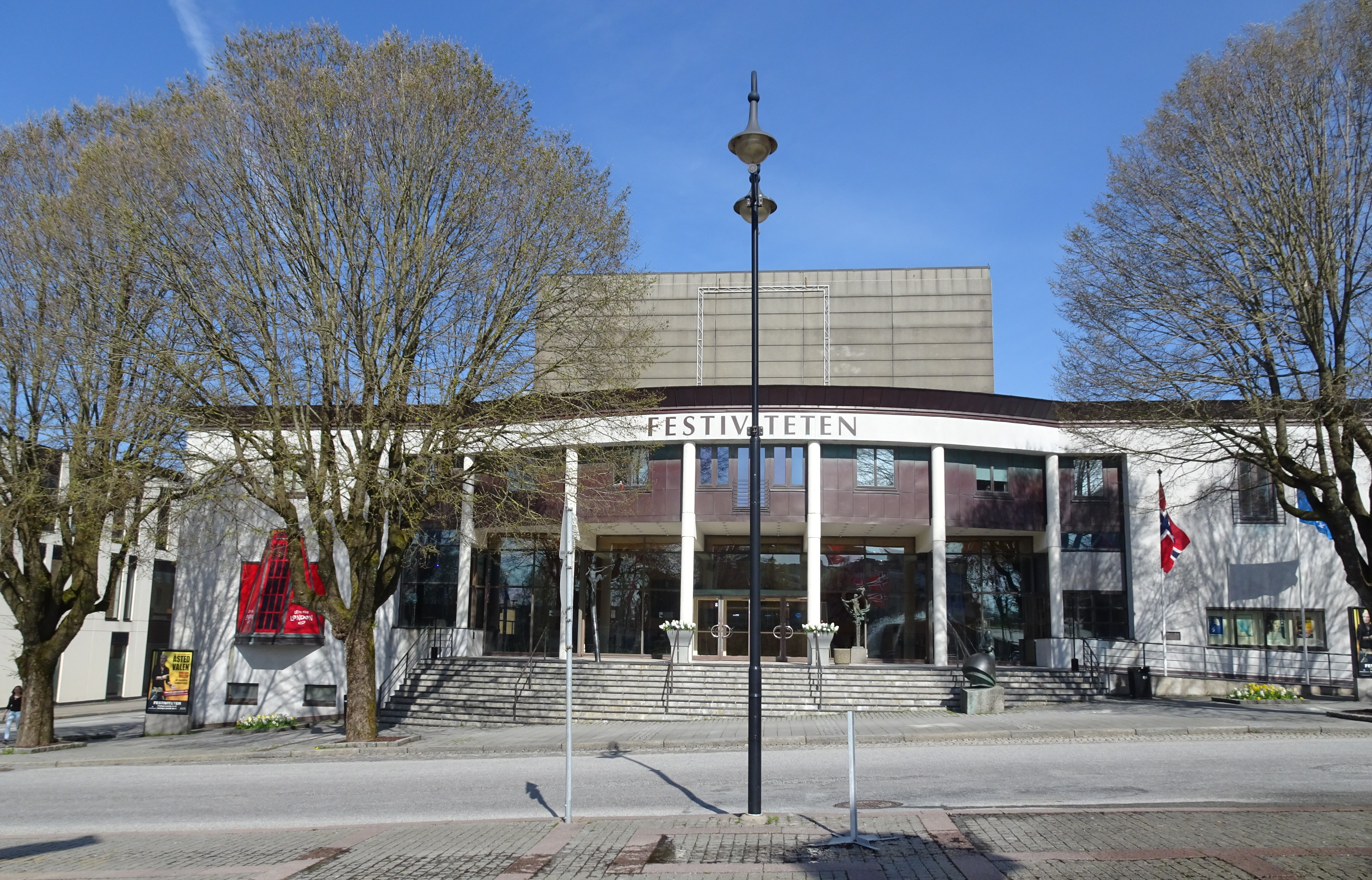 Konserthuset Festiviteten i Haugesund, oppført 1986. Arkitekter: Aksel Brekke, Alexis Pontvik og Per Oscar Haaland.